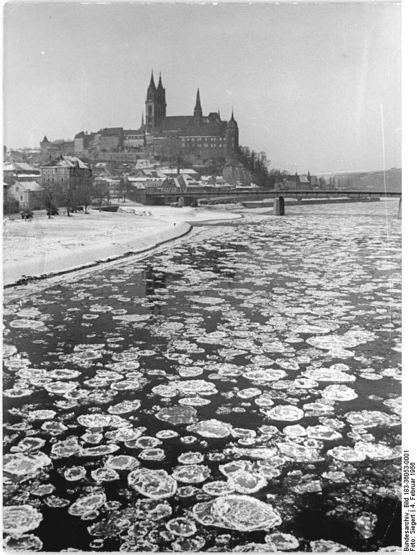 Meißen, Elbe, Winter Zentralbild Siegert 4.2.1956 Elbe hat Eisgang Einige Tage strenger Frost haben für Eisgang auf der Elbe genügt. Doch genausoschnell, wie der Frost kam, verschwand er wieder und so wird es wohl nicht zum Zufrieren reichen, sondern vorläufig bei den Eisschollen bleiben. UBz: Blick auf die Elbe bei Meissen. Information added by Wikimedia users.